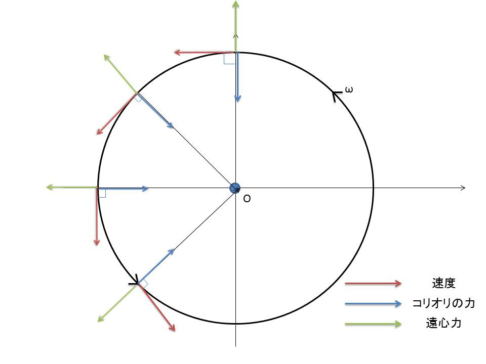 速度、加速度、コリオリ力、遠心力